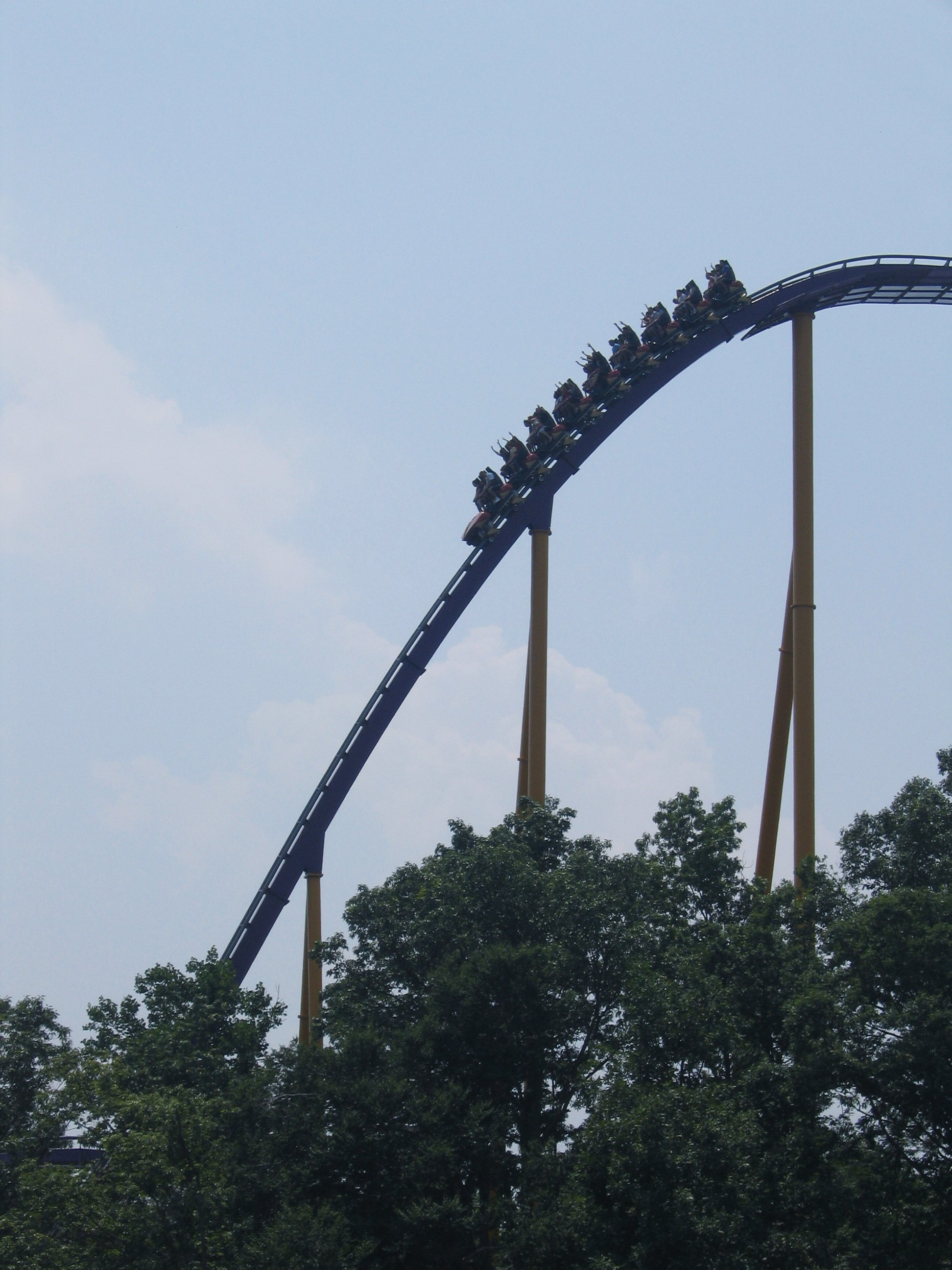 Apollo's Chariot , montagnes russes à Busch Gardens Europe